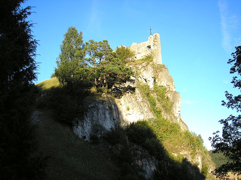 Burg Hütting (Markt Rennertshofen, Landkreis Neuburg-Schrobenhausen, Oberbayern). Ansicht von Südwesten. Eigene Aufnahme, Aug. 2007 / Huetting castle near Rennertshofen (Upper Bavaria, Germany). View from south-east. Own photo, Aug. 2007